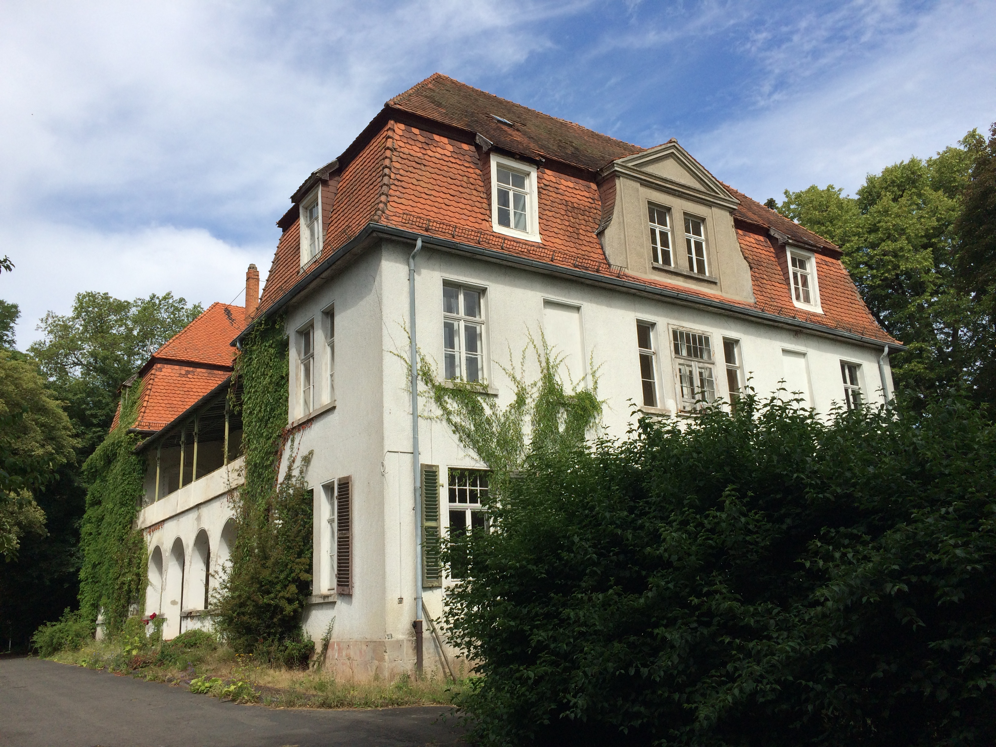 Schloss Rittershain östlich von Rockensüß, Cornberg